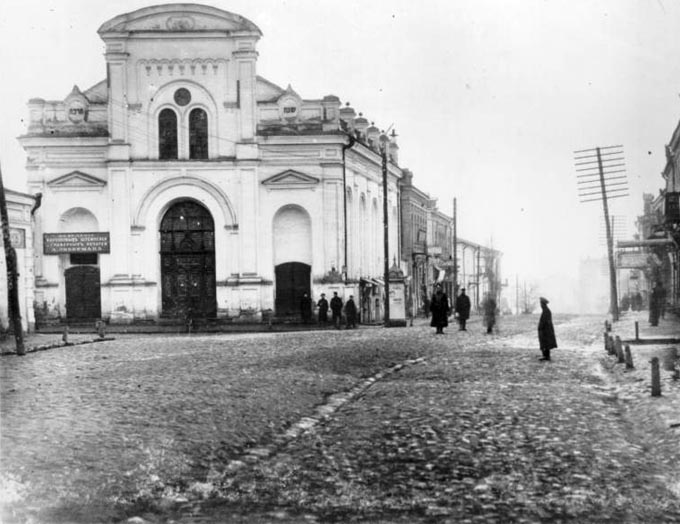 Большая Хоральная Синагога